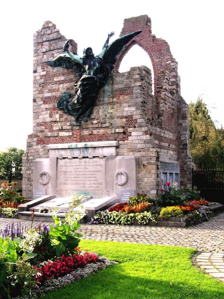 Oorlogsmonument op de verwoeste Sint-Amandskerk (7 okt 2004) in Belle - eigen foto